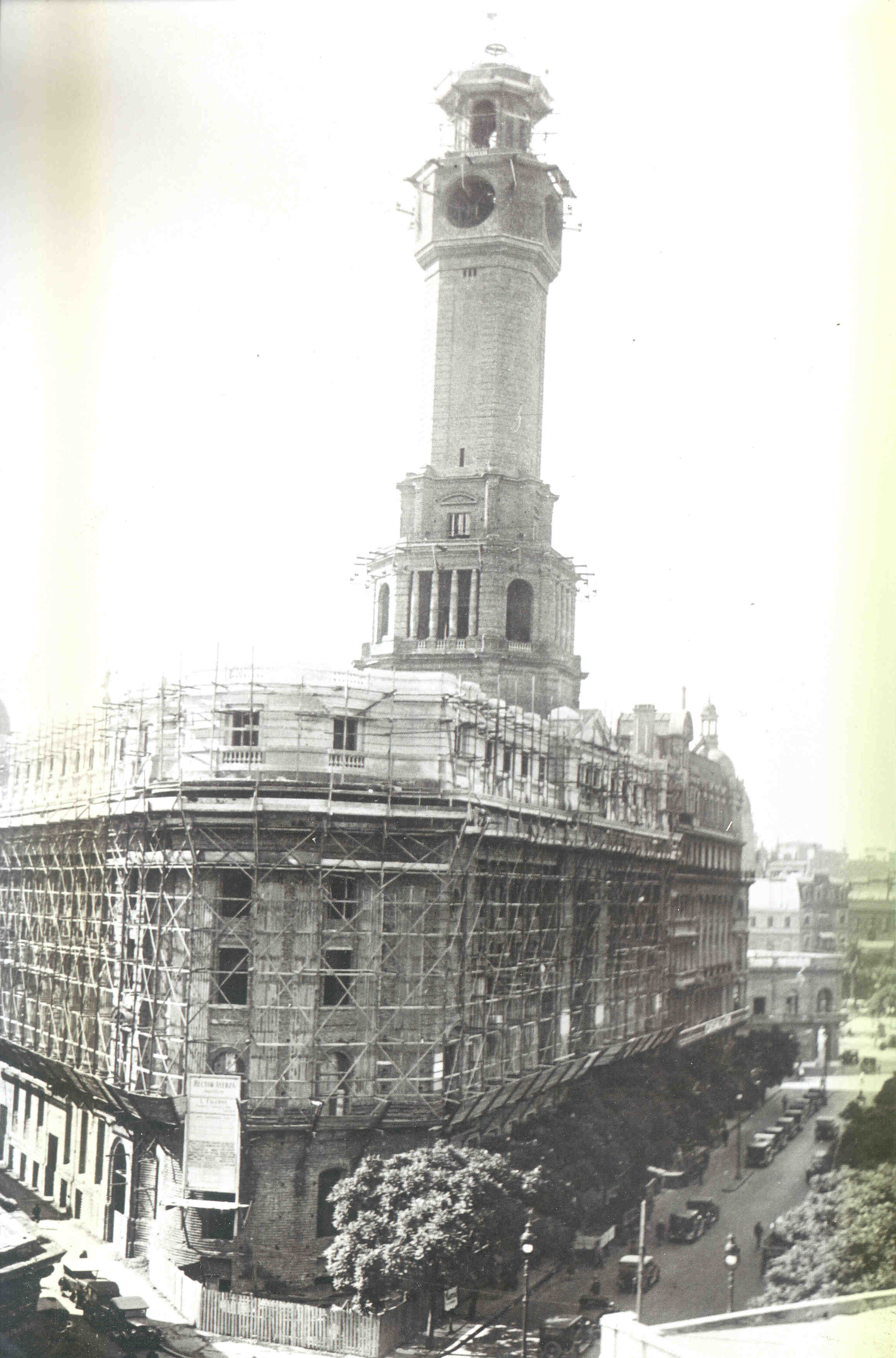 Obras de construcción del Palacio de la Legislatura de la Ciudad de Buenos Aires